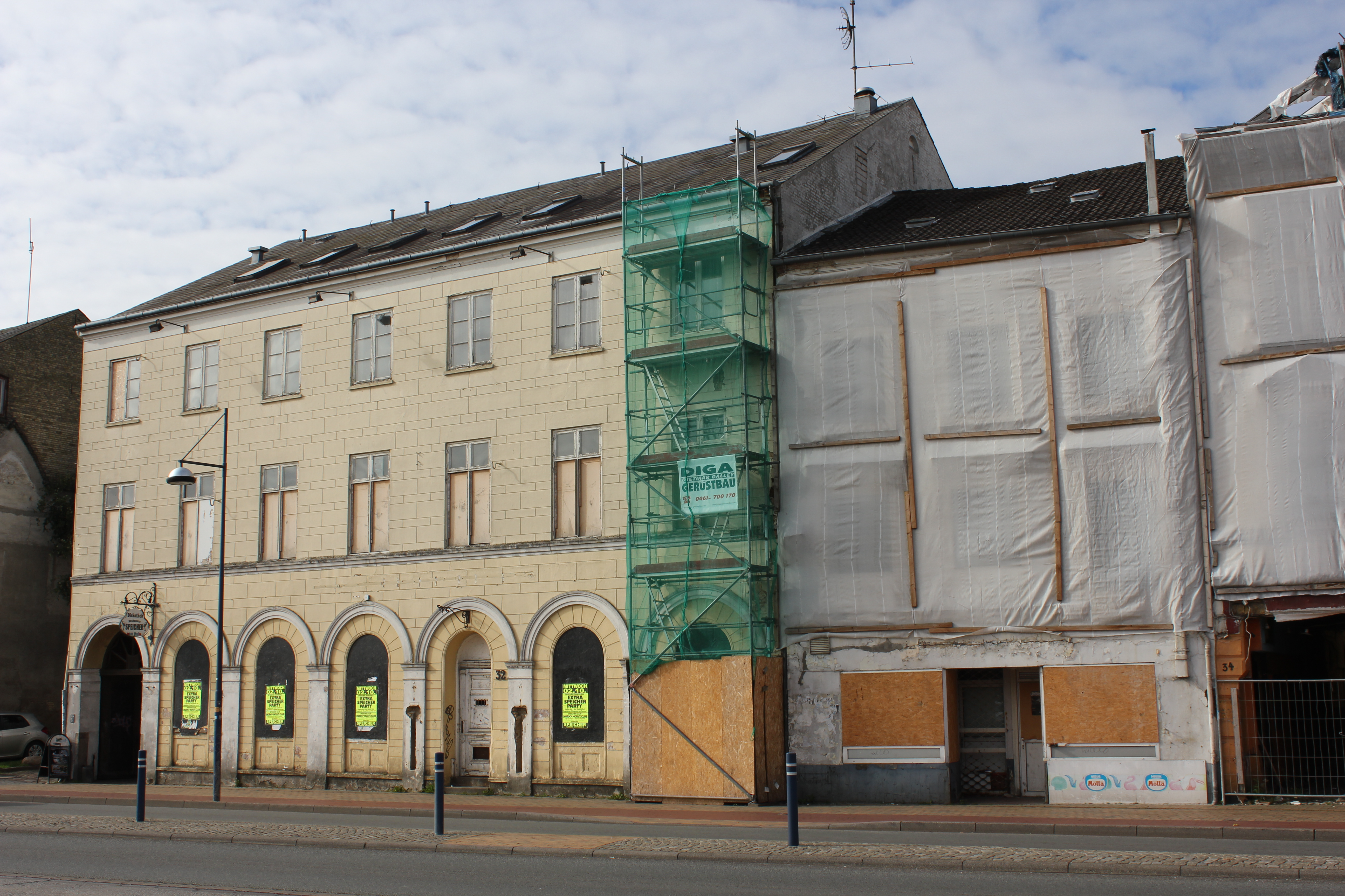 Altes Eroscenter (Kaisershof) mit dem Gebäude daneben, Schiffbrücke 32-33 (Flensburg 2013)